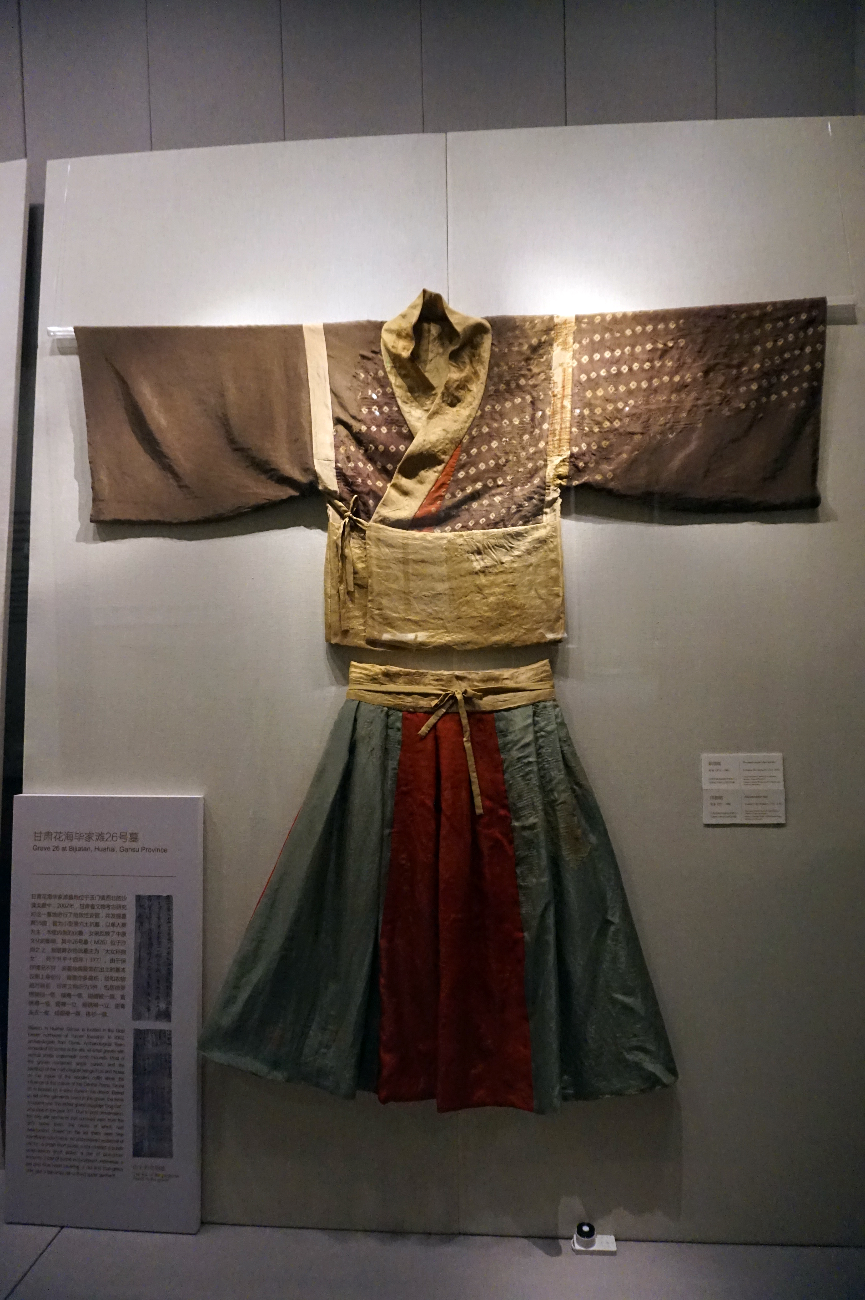 前秦紫缬襦、绯碧裙。甘肃花海毕家滩26号墓出土，甘肃省文物考古研究所藏。见于中国丝绸博物馆。